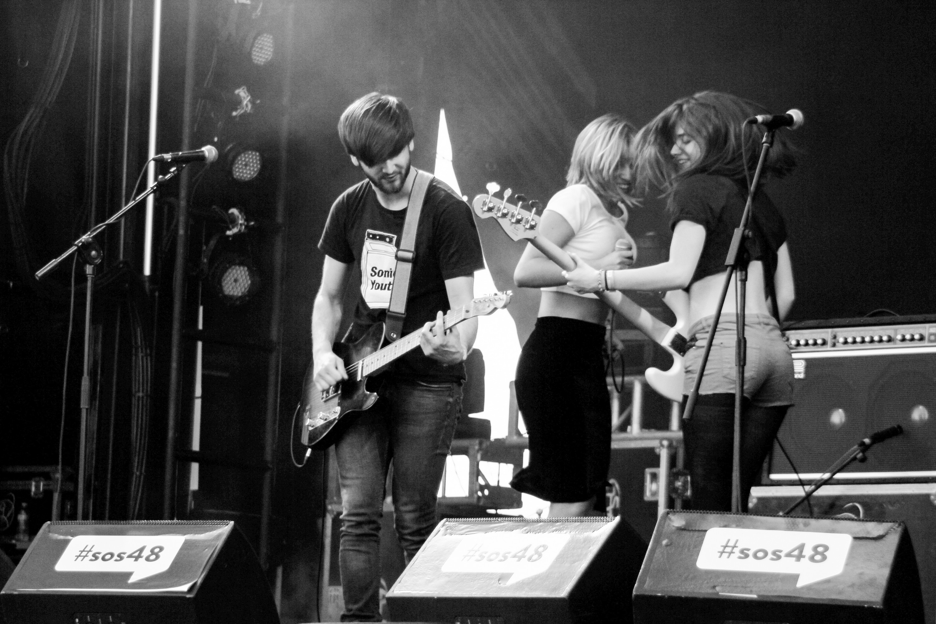 Belako es un grupo de post-punk vasco de la localidad de Munguia, en la provincia de Vizcaya (País Vasco), cuyas canciones están cantadas mayoritariamente en inglés, aunque también incluyen alguna canción en euskera. Concierto en el Festival SOS 4.8 2014 en Murcia.